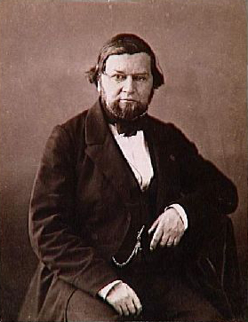 Eugène Peligot, chimiste français (1811-1890)